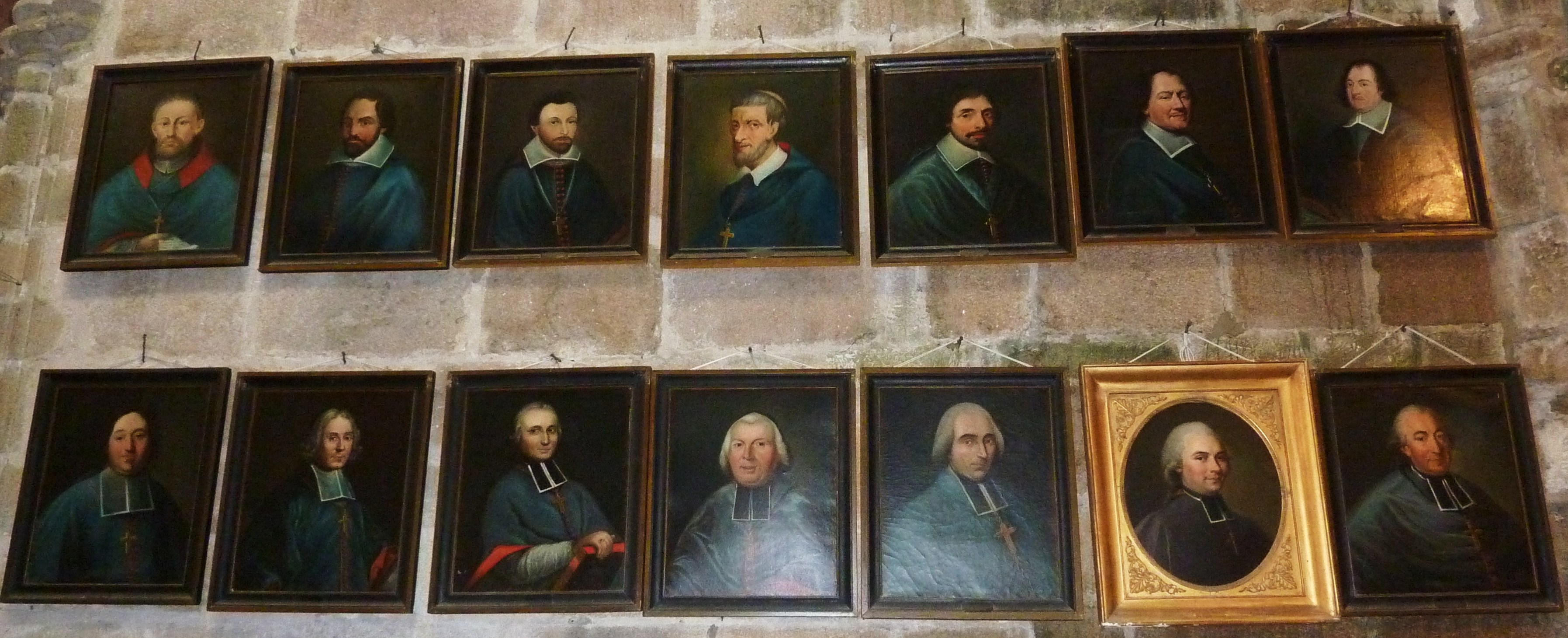 Tréguier, cathédrale : les 14 derniers évêques de Tréguier, entre 1587 et 1801